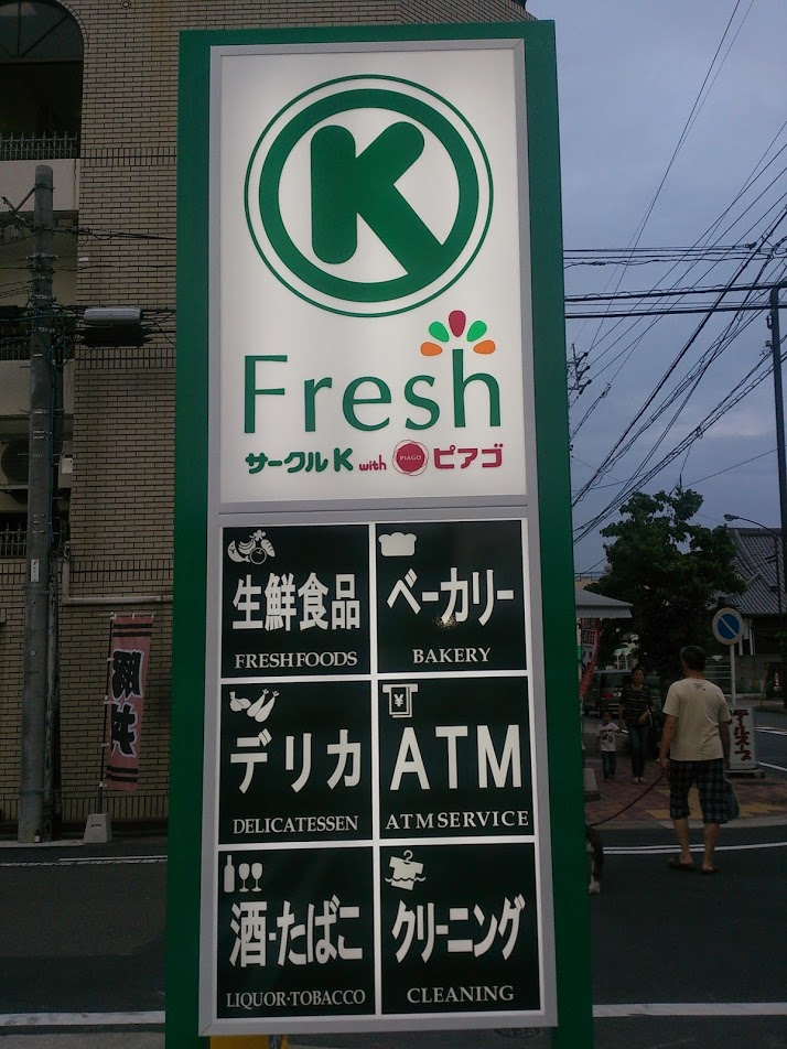 サークルＫフレッシュ店舗看板